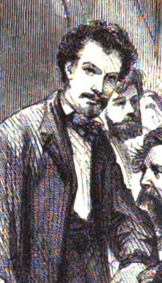 Paul Friedrich Meyerheim, deutscher Maler im 19. Jh.